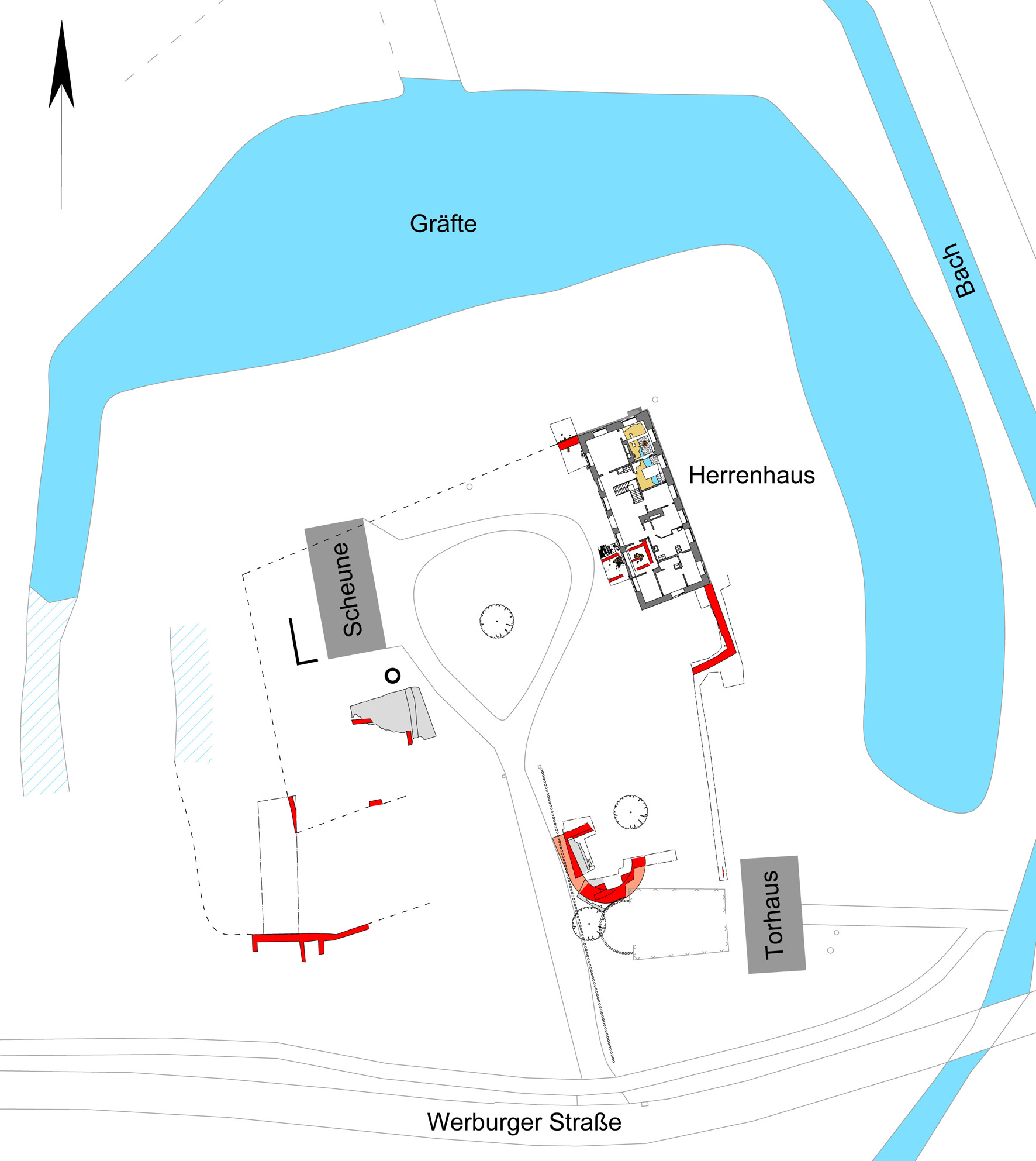 Haus Werburg in Spenge (Westfalen). Plan der archäologisch - bauhistorischen Untersuchungen, Stand Mitte 2010. Das Herrenhaus ist 27 m lang.